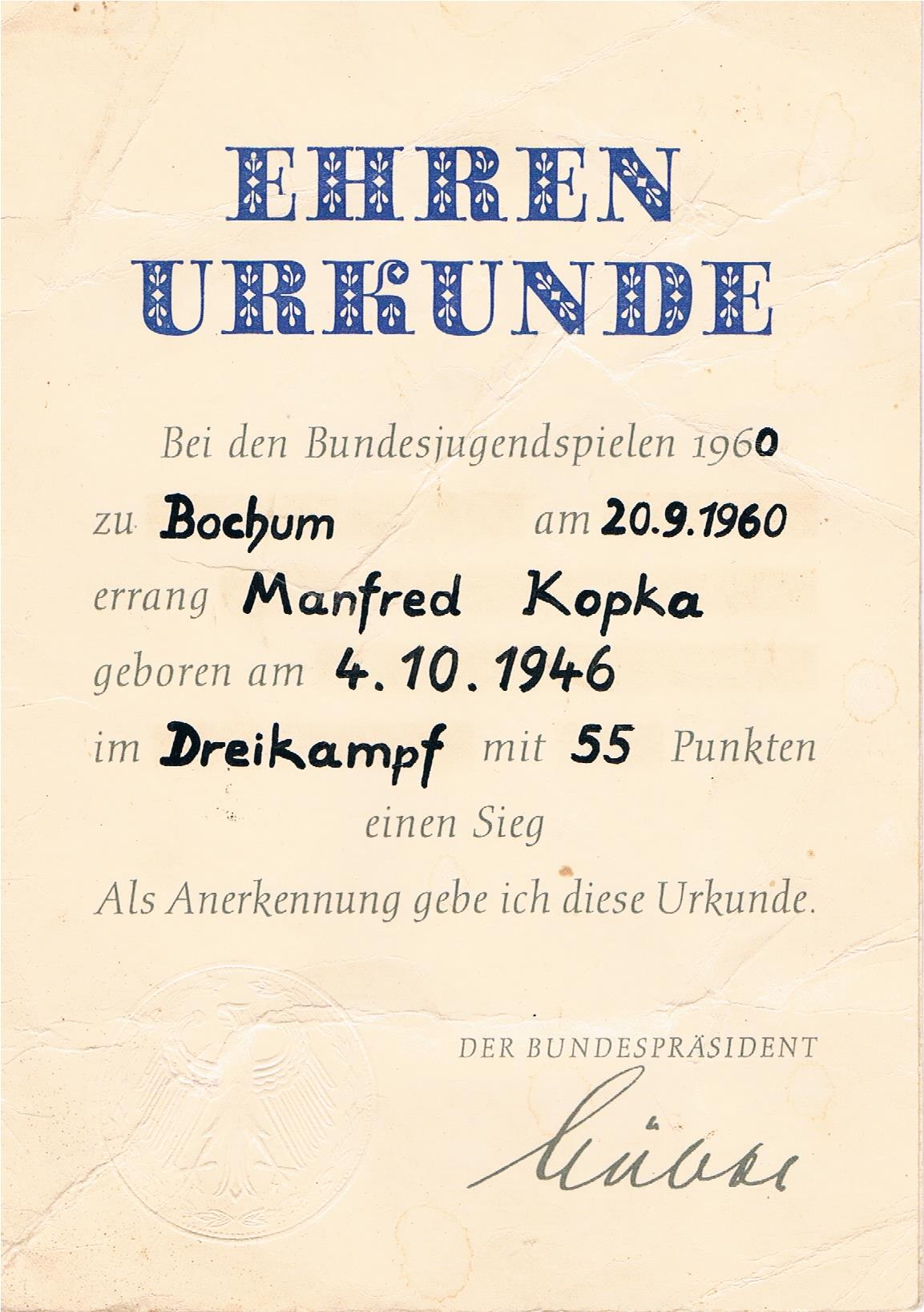 Persönliche Ehrenurkunde der Bundesjugendspiele 1960